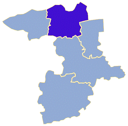 Powiat sulęciński - Gmina Krzeszyce